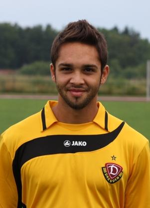 Tony Mamodaly